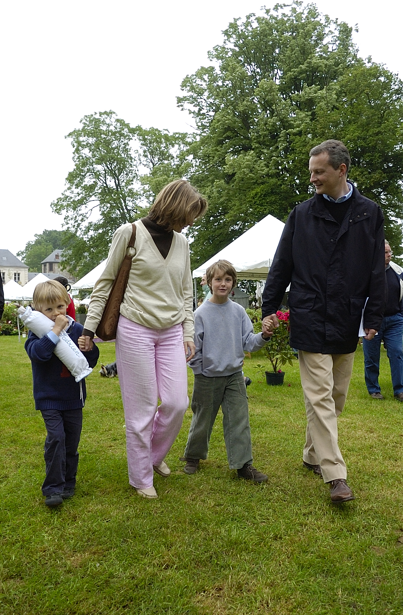 Bruno Le Maire Fête des fleurs, Trangis, Evreux 26/05/2007